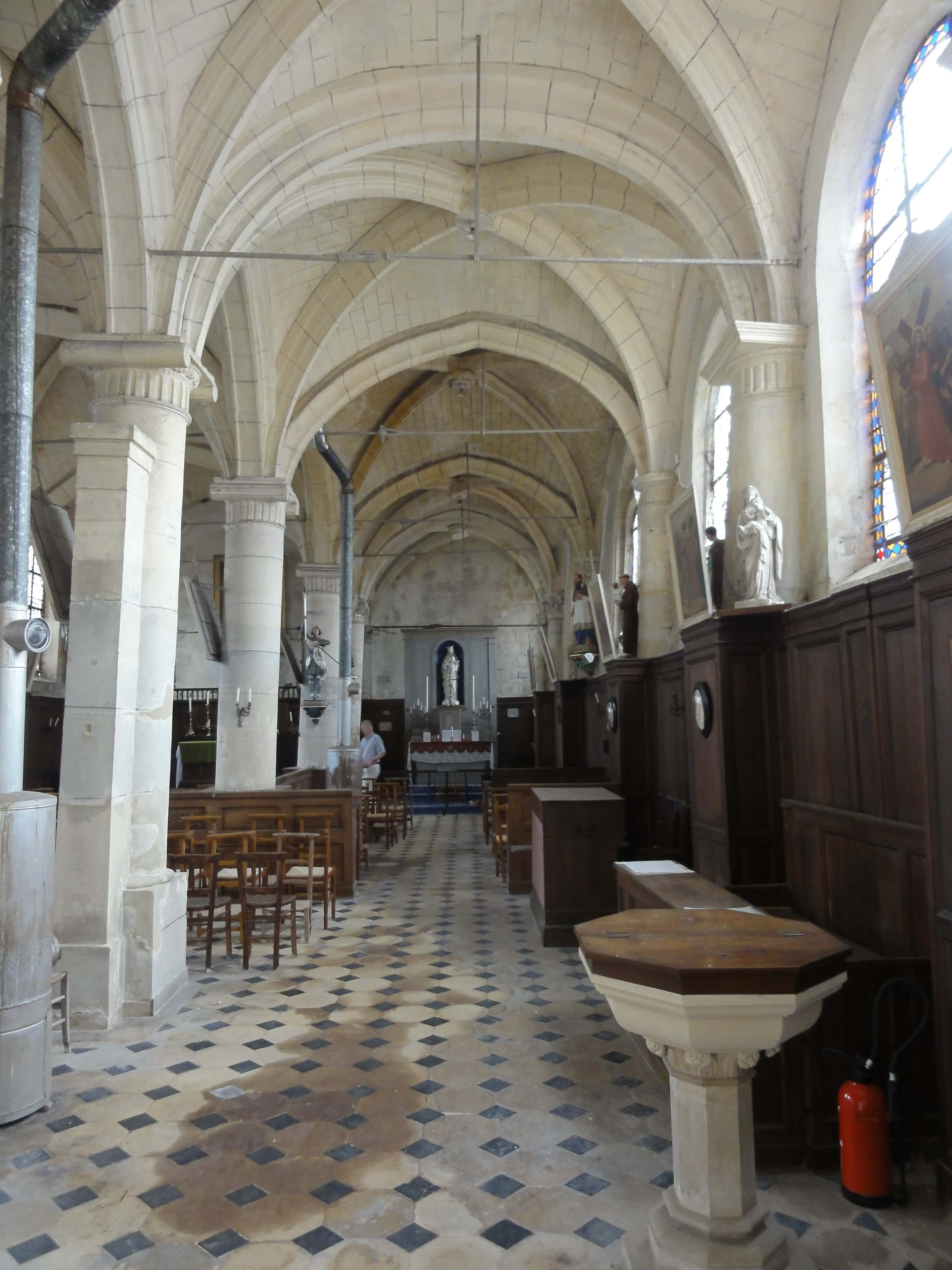 Intérieur de l'église (voir titre).